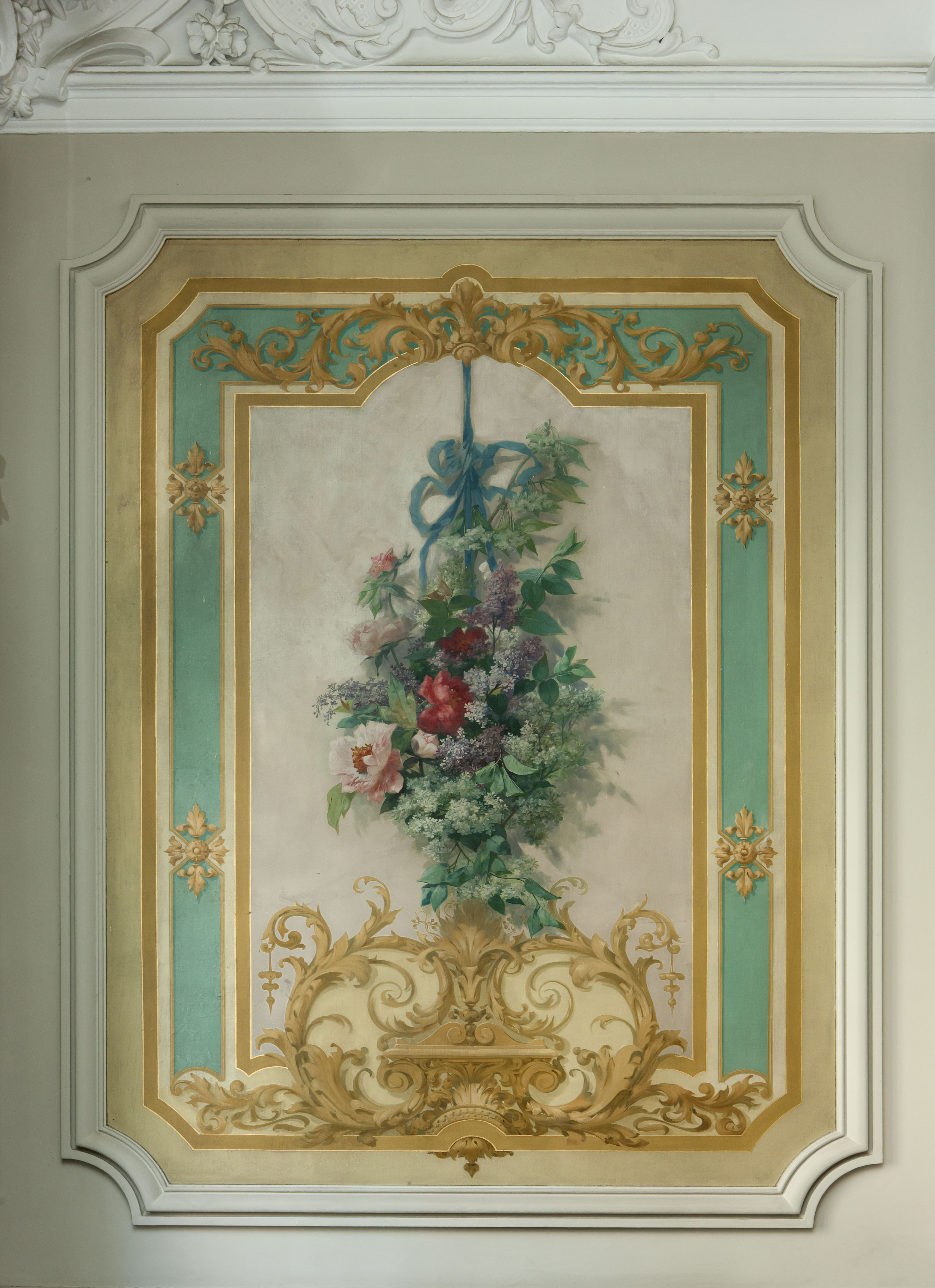 Décor intérieur peint par Paul-Joseph Carpay dans la maison "Begasse de Dhaem" à Liège